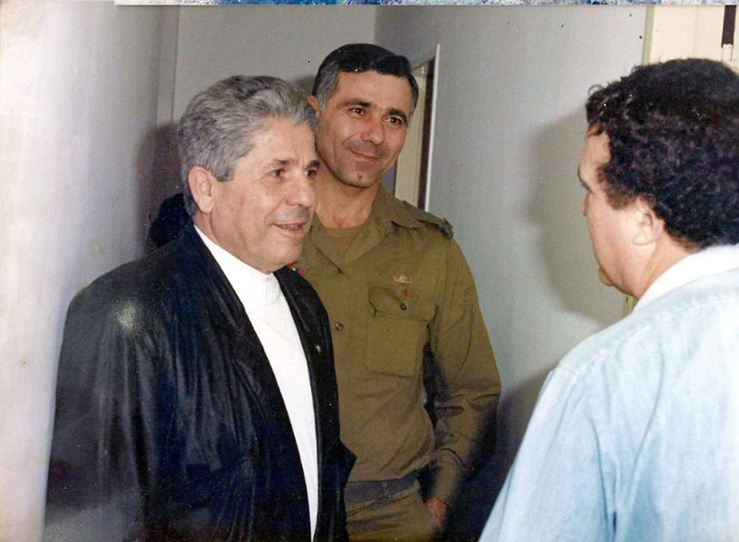 אנטואן לאחד מאחורי הקלעים נפגש עם יהורם גאון בליווי דוד אגמון